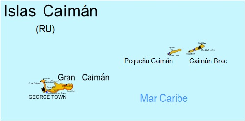 Información de Wikipedia